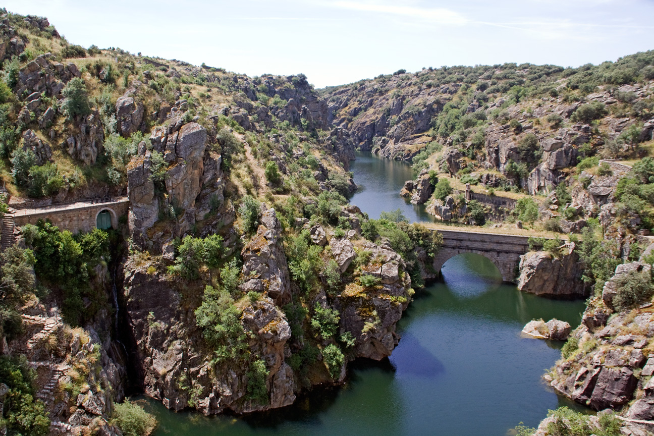 Canal de El Villar: inicio del canal, junto al embalse de El Villar. Acueducto sobre el rio Lozoya, a donde llega la recula del embalse de El Atazar.